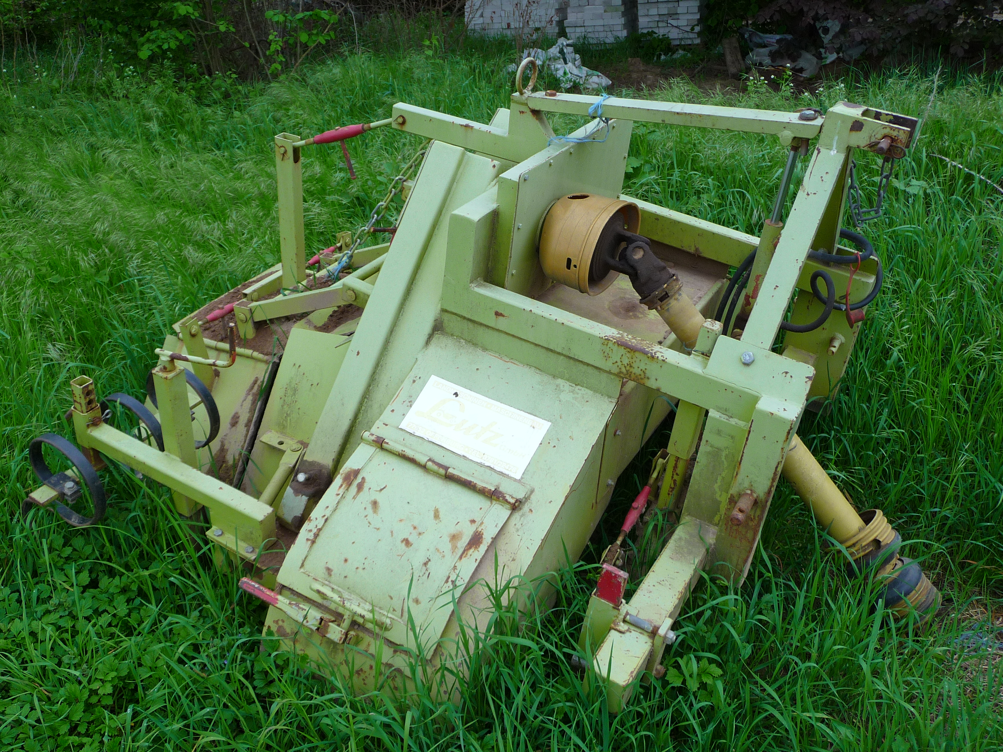 Spargeldammfräse der Firma Lutz, fotografiert in Heidelberg (Baden-Württemberg, Deutschland) in der Nähe von Spargelfeldern